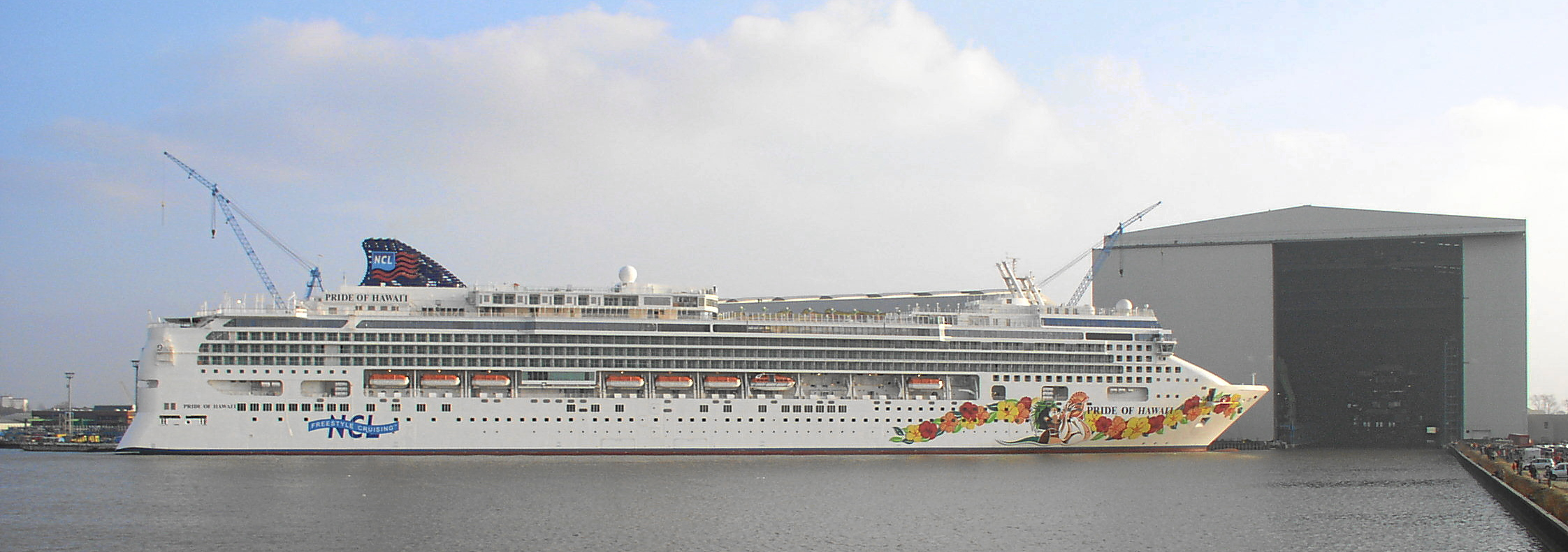 Die Pride of Hawaii am Tag der Ausdockung vor der Meyerwerft in Papenburg Quelle: selbst fotografiert am 19. Feb. 2006, H.H.Schoe